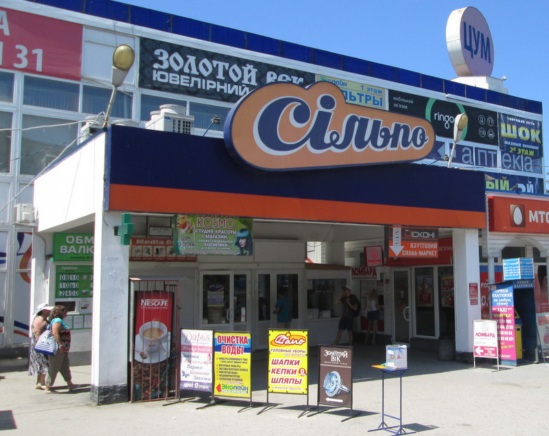 Сільпо на Вакуленчука